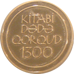 1999-cu ildə “Kitabi-Dədə Qorqud” dastanının 1300 illiyinə həsr olunmuş 100 Manat dəyərində qızıl xatirə sikkələri buraxılmışdır.